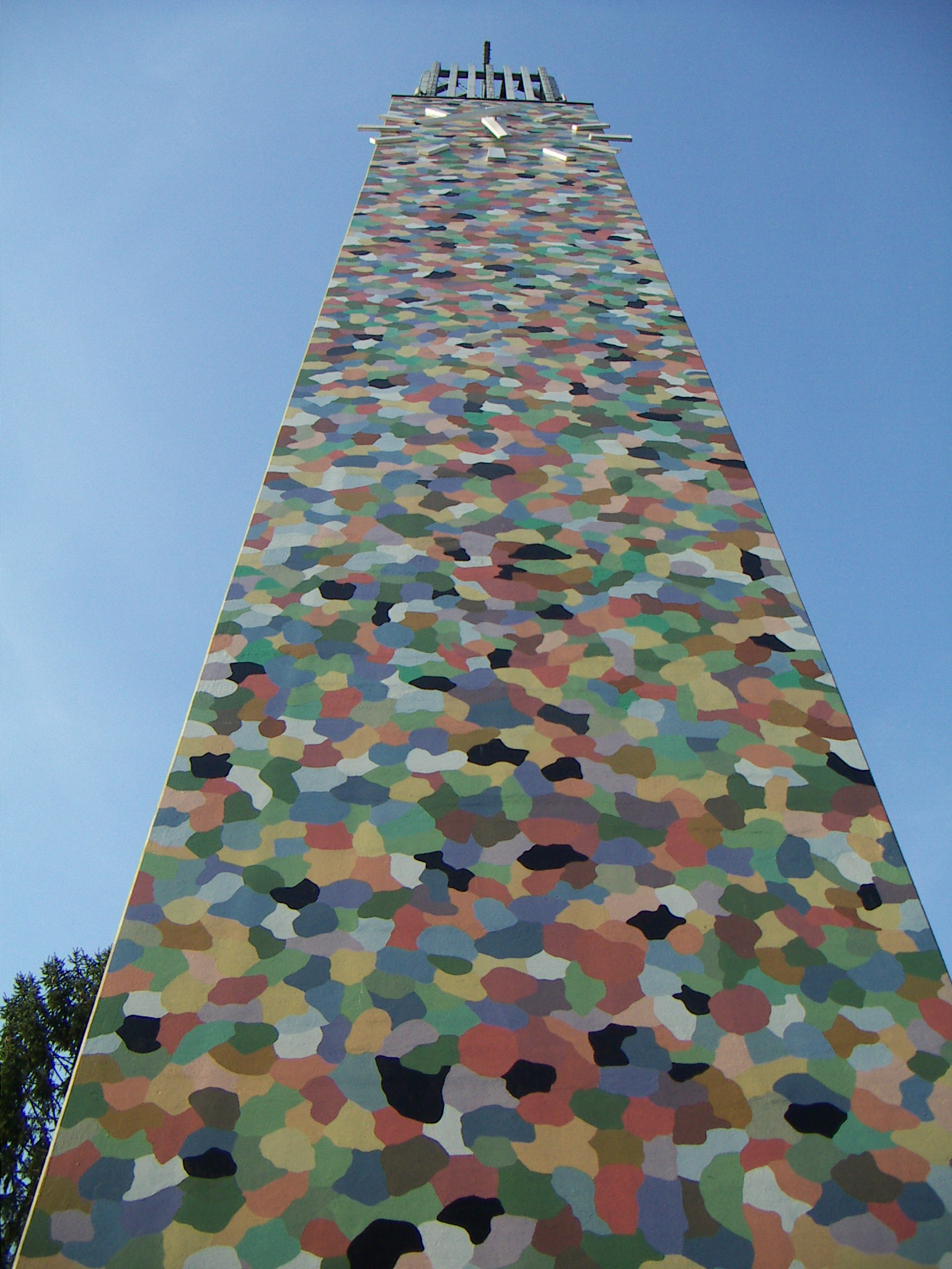 St. Leonhard Stadtpfarrkirche in Feldbach (Steiermark), Kirchturm, Bemalung Entwurf Gustav Troger mit 20 Jugendlichen der Pfarre im Jahre 1987